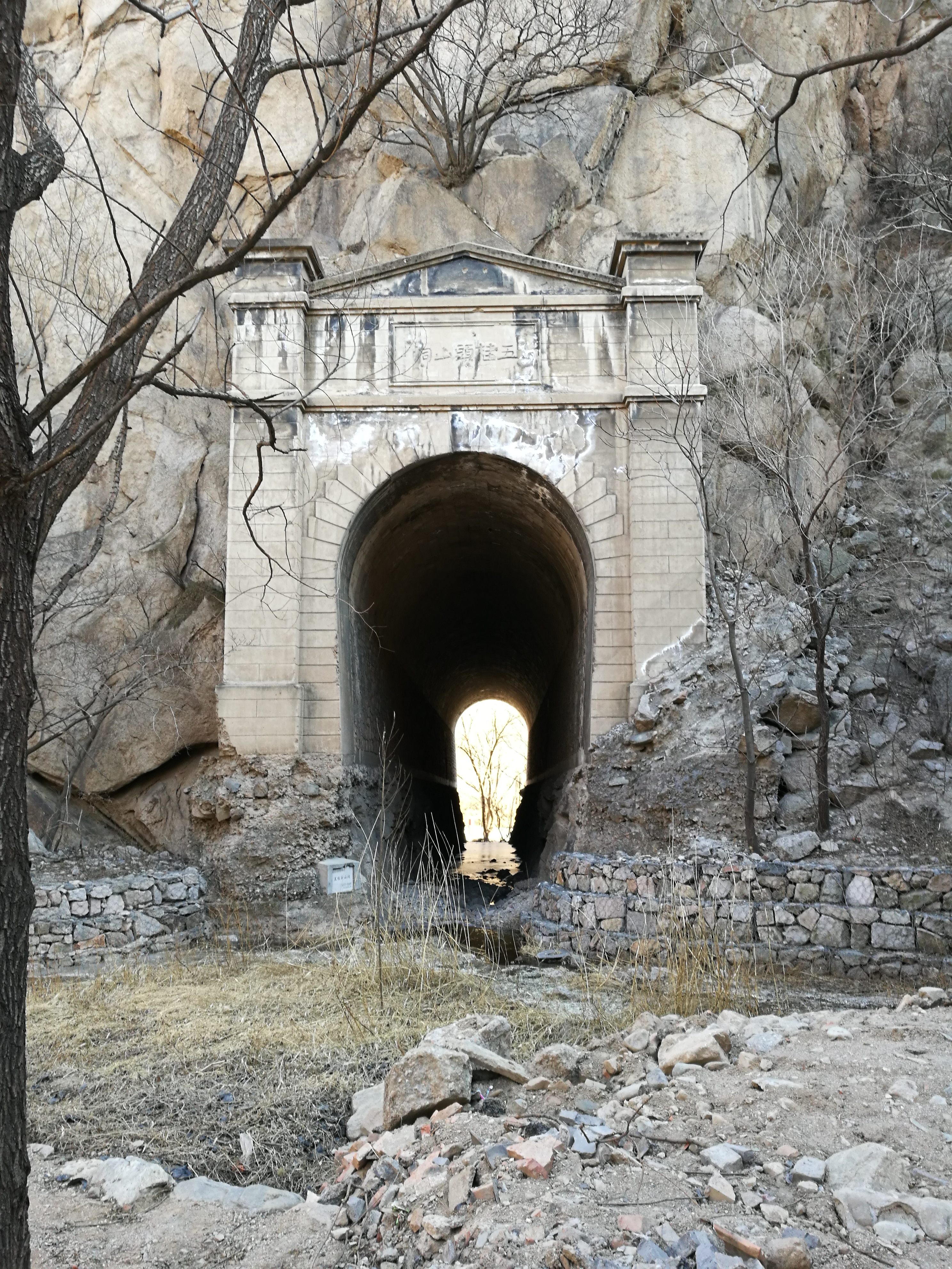 旧五桂头隧道，路基已被冲毁。